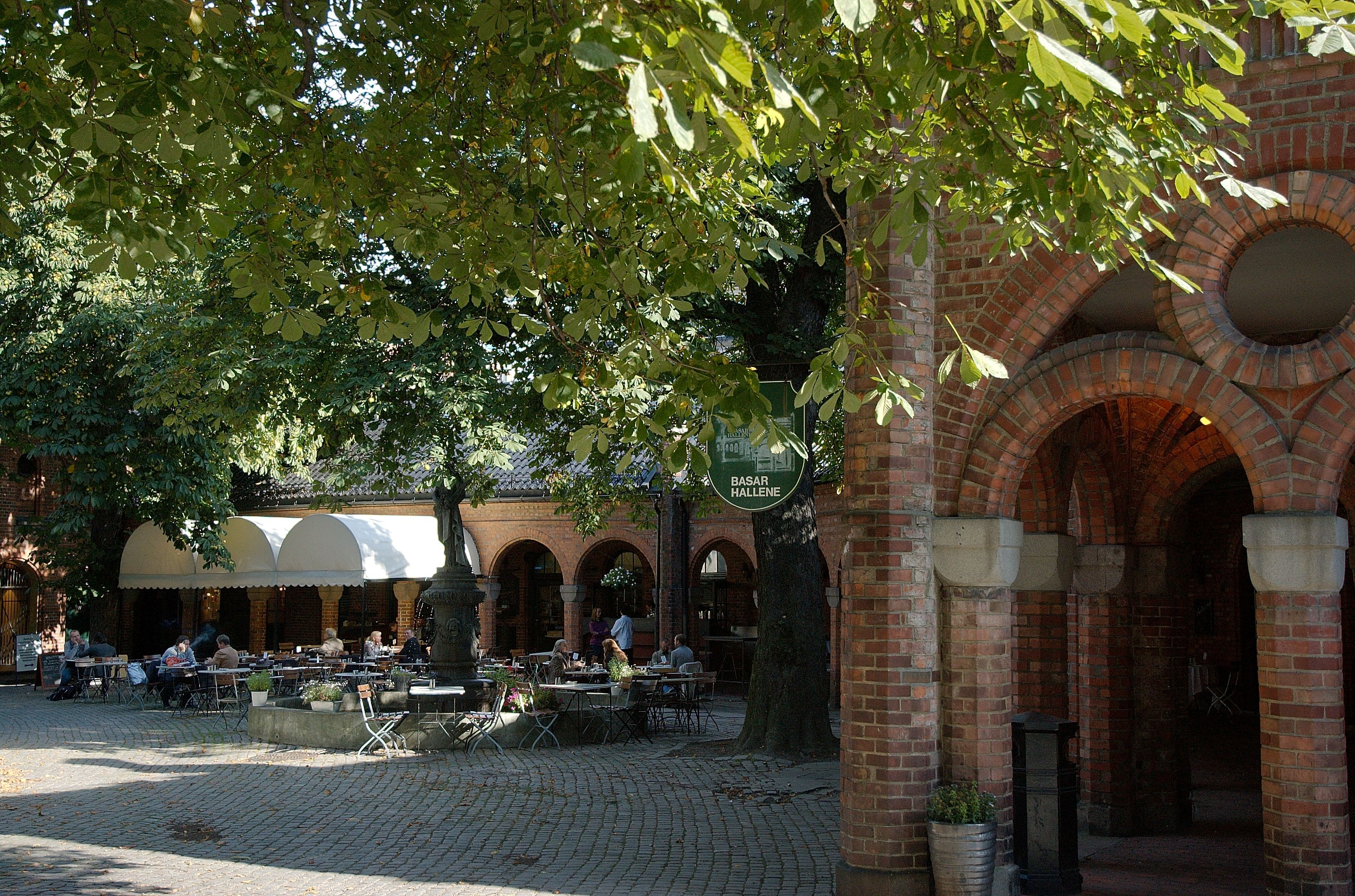 Basarhallene